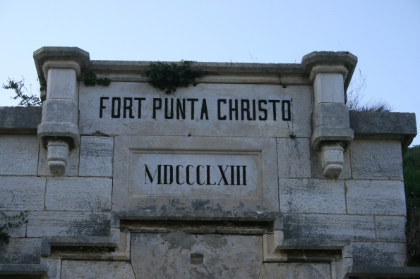 Slika prikazuje naziv tvrđave i godinu